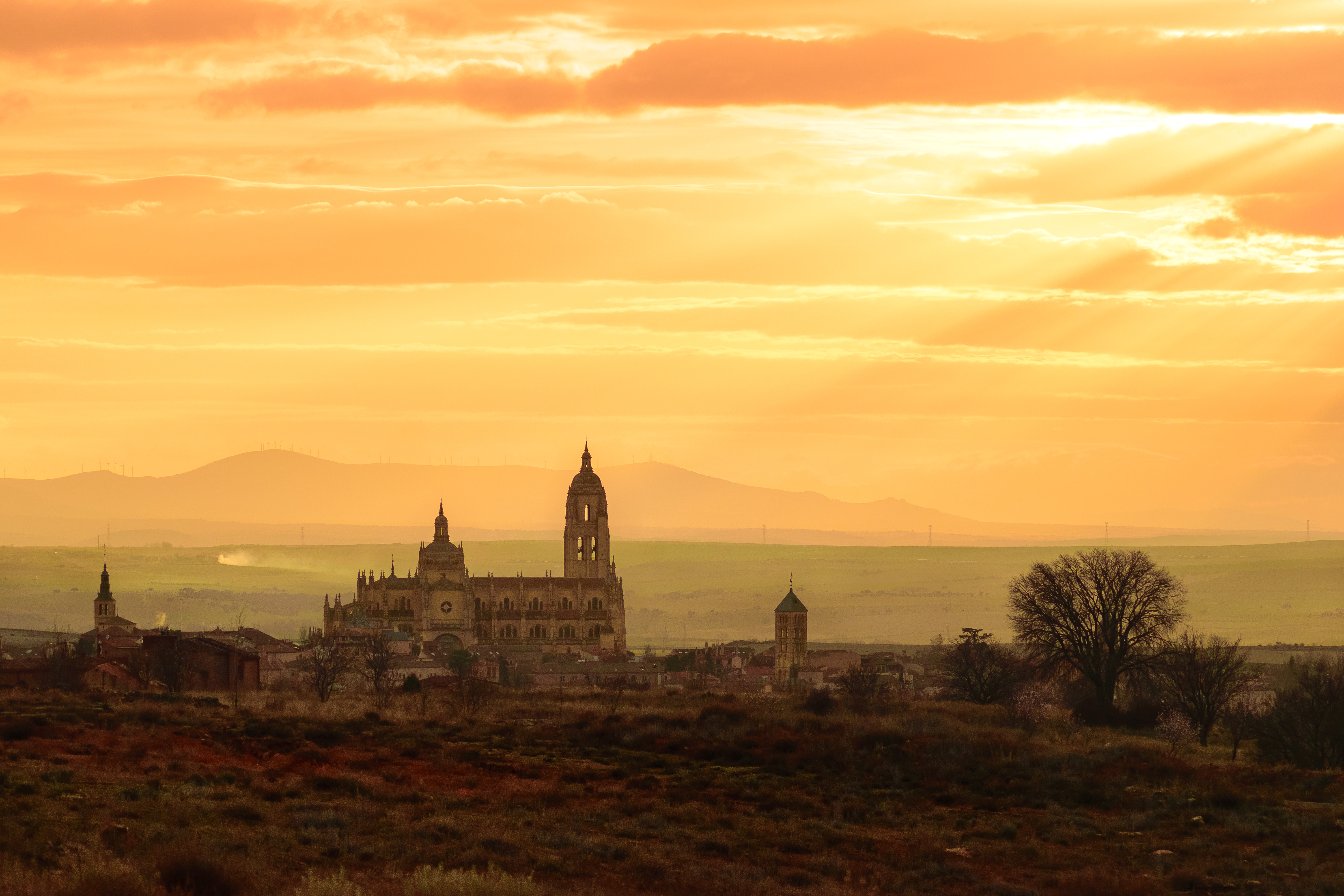 Iba tan absorto que perdí el camino de nuevo. Tantas veces me había ocurrido con anterioridad... Uno de los problemas de querer tomar LA foto es que el tiempo es limitado, y las condiciones, imprevisiblemente previsibles. No era esta la foto que andaba buscando, aunque puedo jurar que el resultado es mucho mejor. Aquella tarde... aquella tarde fue sencillamente un capricho de la causalidad.